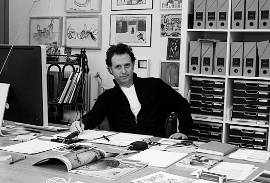 Pablo Reinoso